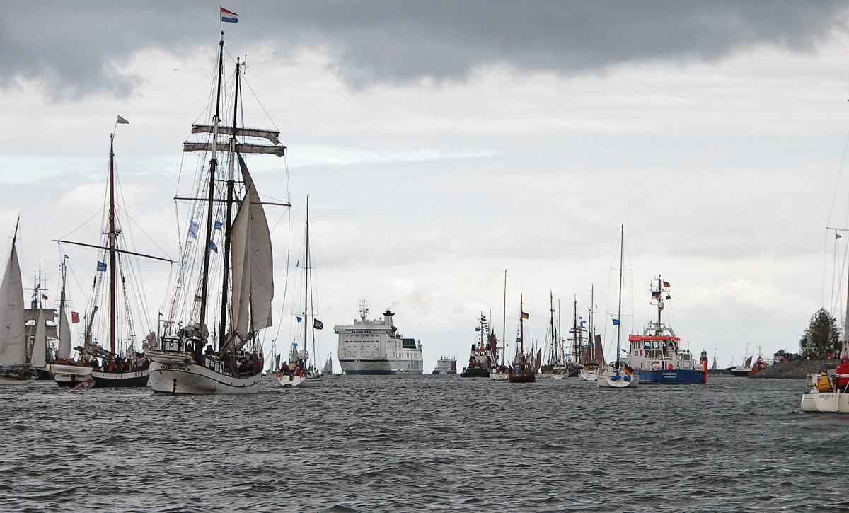 Beschreibung: Hanse Sail 2005 / Warnemünde Fotograf: Darkone, 13. August 2005